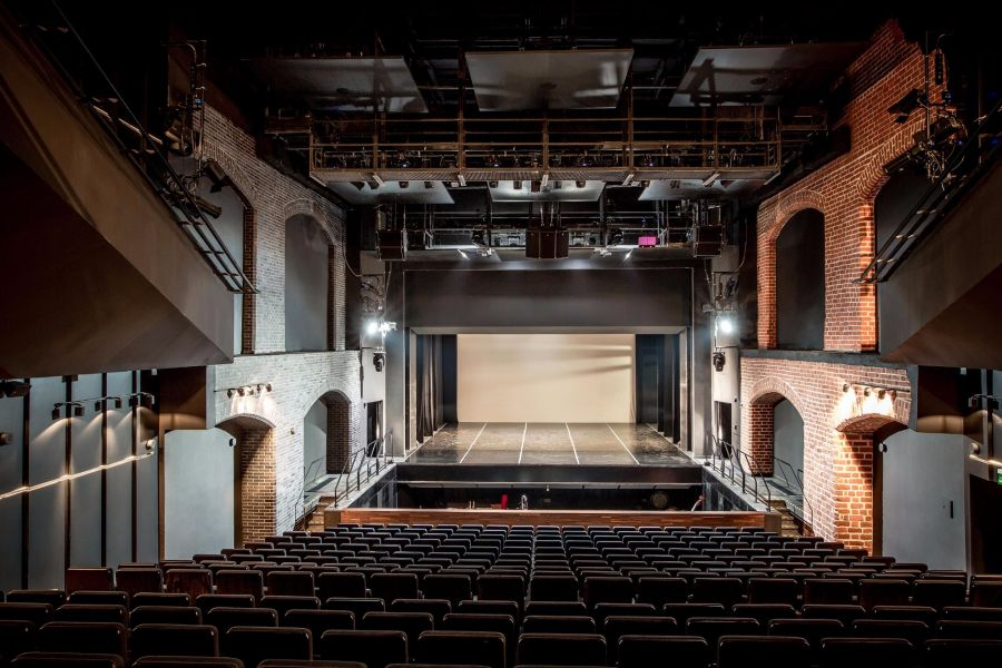 Opera na Zamku w Szczecinie - widownia i scena